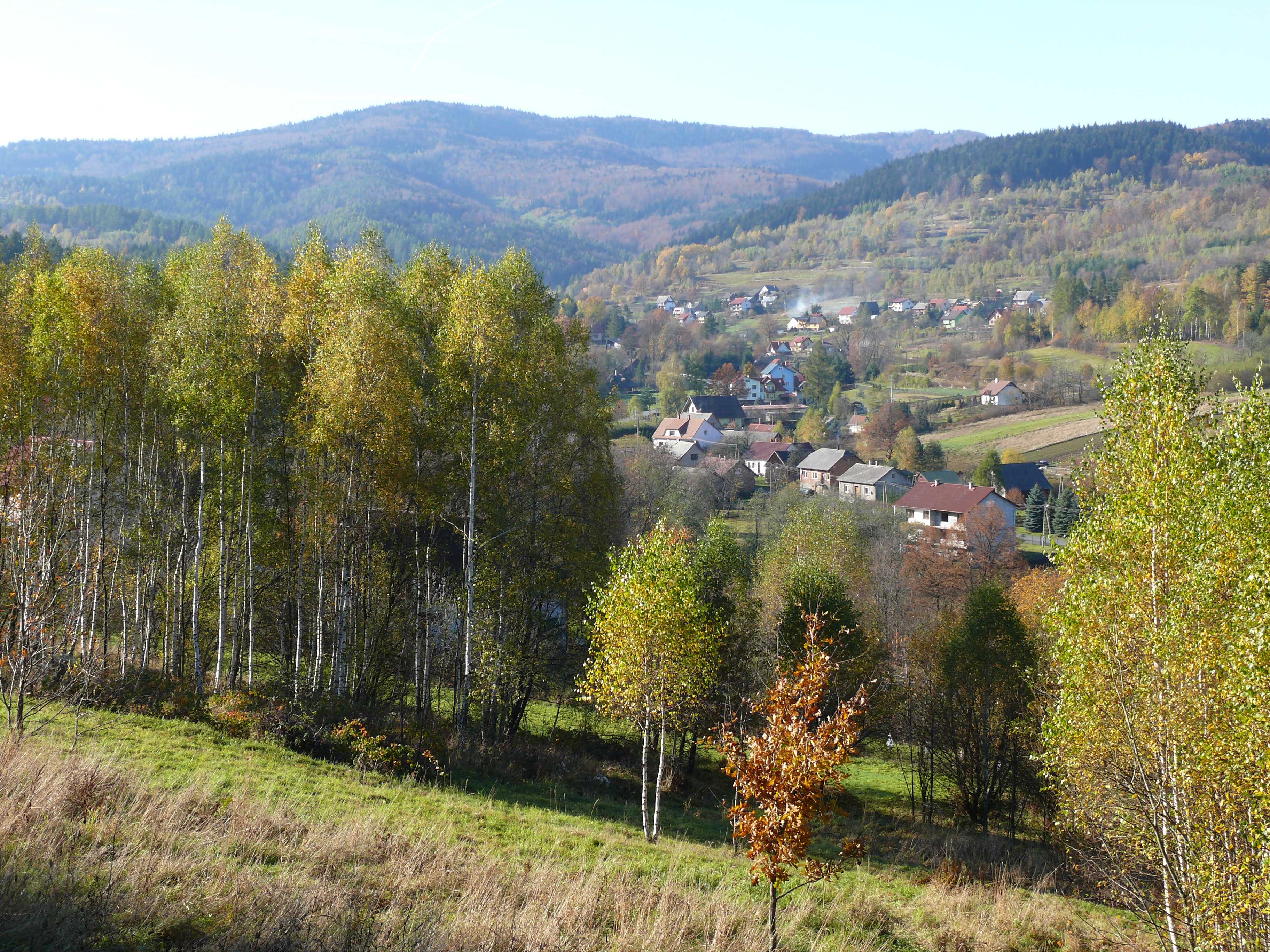 Tarnawa Górna - panorama